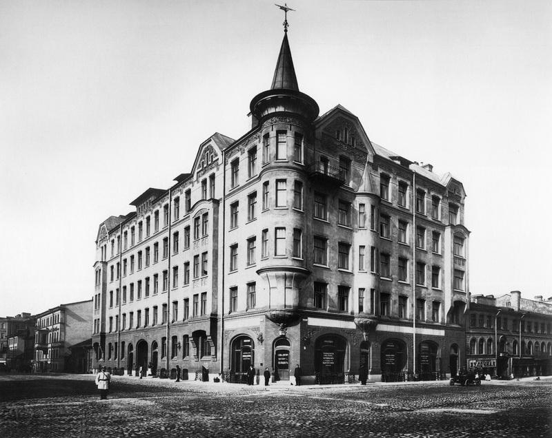 Санкт-Петербург. Ул. Херсонская, д. 13/12. Доходный дом архитектора К. К. Шмидта. 1901—1902.